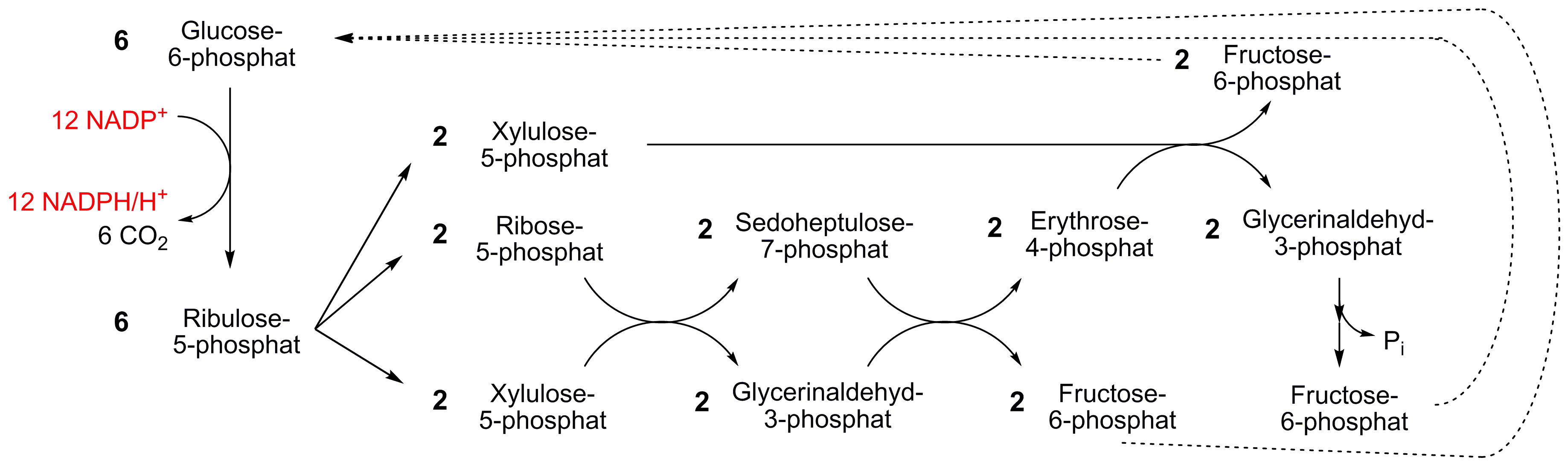 Pentosephosphatweg; hier Variante, um viel NADPH zu generieren